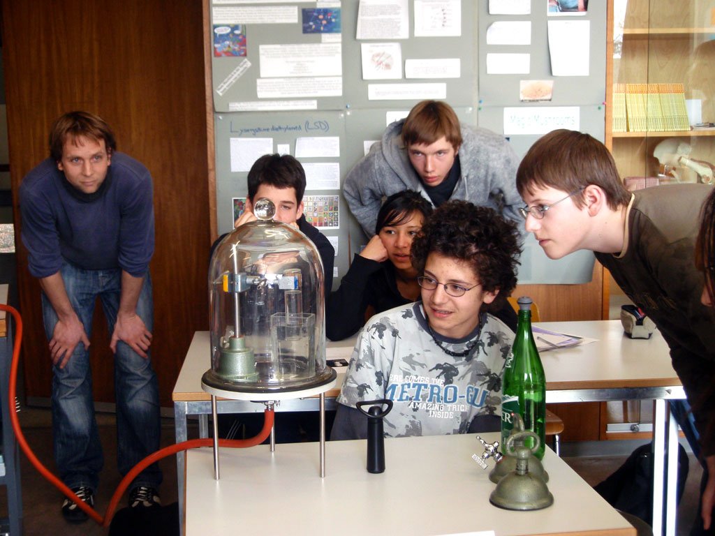 Prof. Dr. Dr. Marc Eyer (links) und Schüler der 9. Klasse bei einer Vorführung des Lehrstücks "Pascals Barometer"